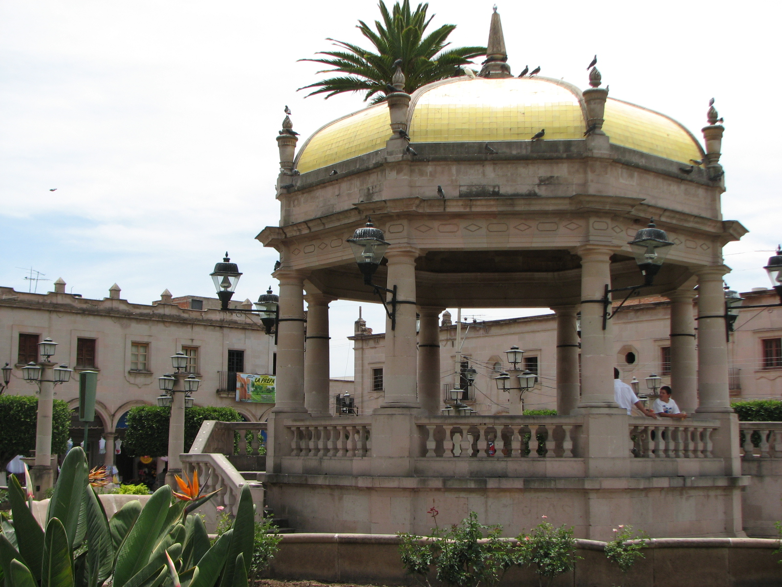 Kiosko de Yahualica